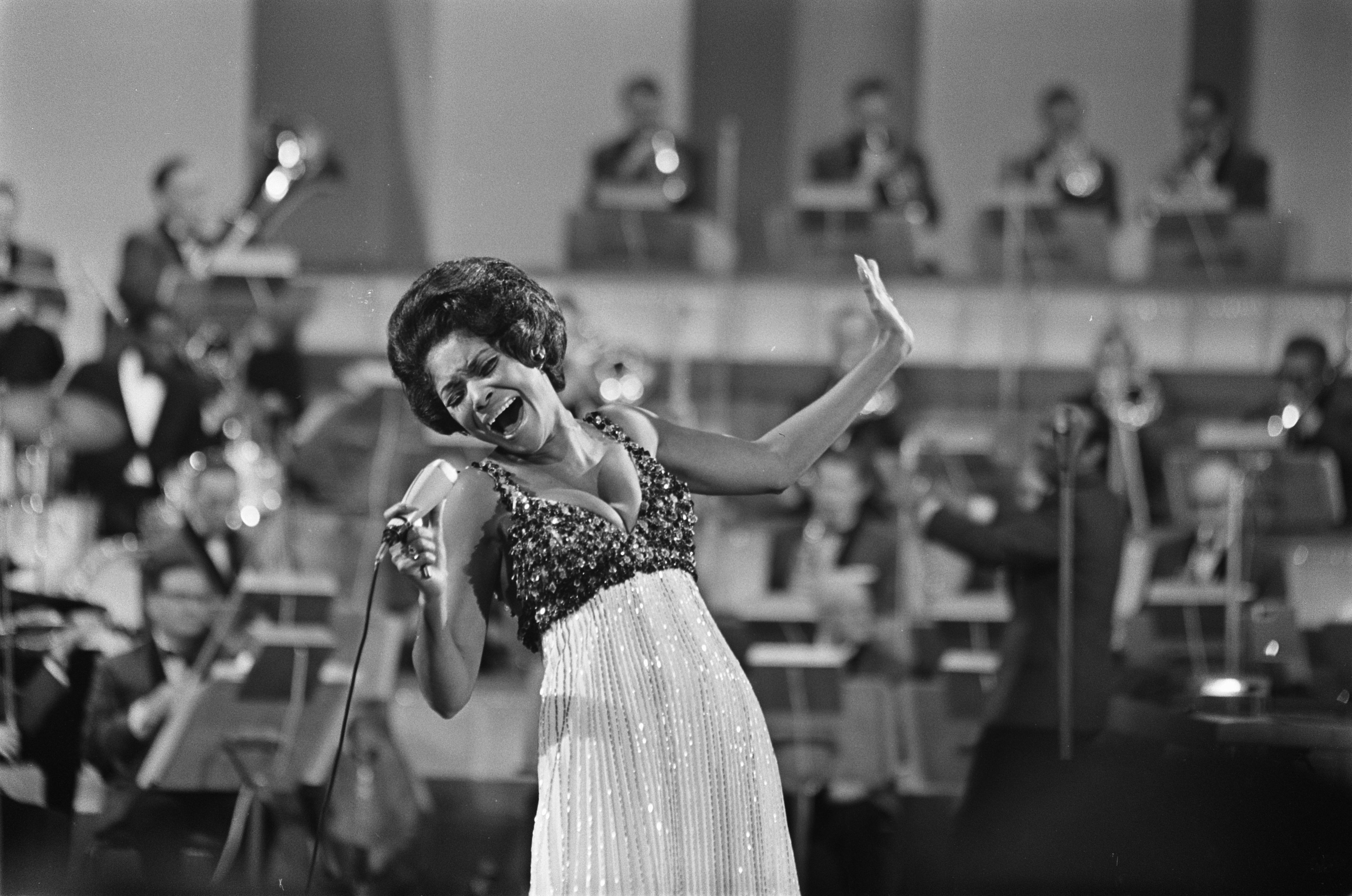 Collectie / Archief : Fotocollectie Anefo Reportage / Serie : Grand Gala du Disque 1968 Beschrijving : Grand Gala du Disque in de RAI .Nancy Wilson Datum : 8 maart 1968 Locatie : Amsterdam Trefwoorden : zangers Persoonsnaam : Wilson, Nancy Fotograaf : Kroon, Ron / Anefo Auteursrechthebbende : Nationaal Archief Materiaalsoort : Negatief (zwart/wit) Nummer archiefinventaris : bekijk toegang 2.24.01.05 Bestanddeelnummer : 921-1494